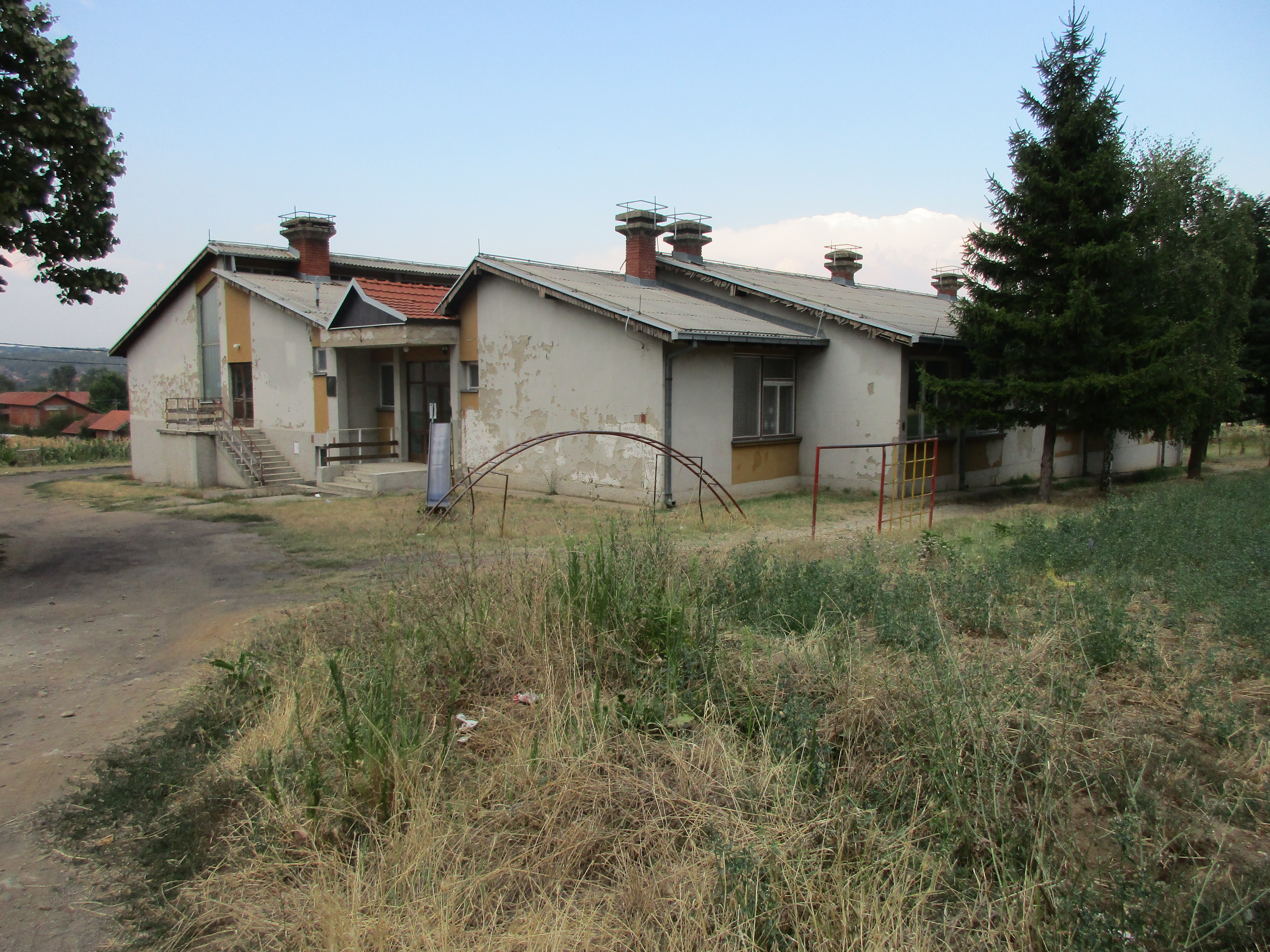 Srpski (latinica): Berilje